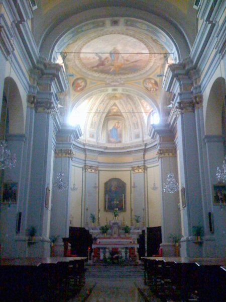 Interno della chiesa parrocchiale della B.M.V. del Rosario di San Giuliano Nuovo con gli affreschi di Rodolfo Gambini